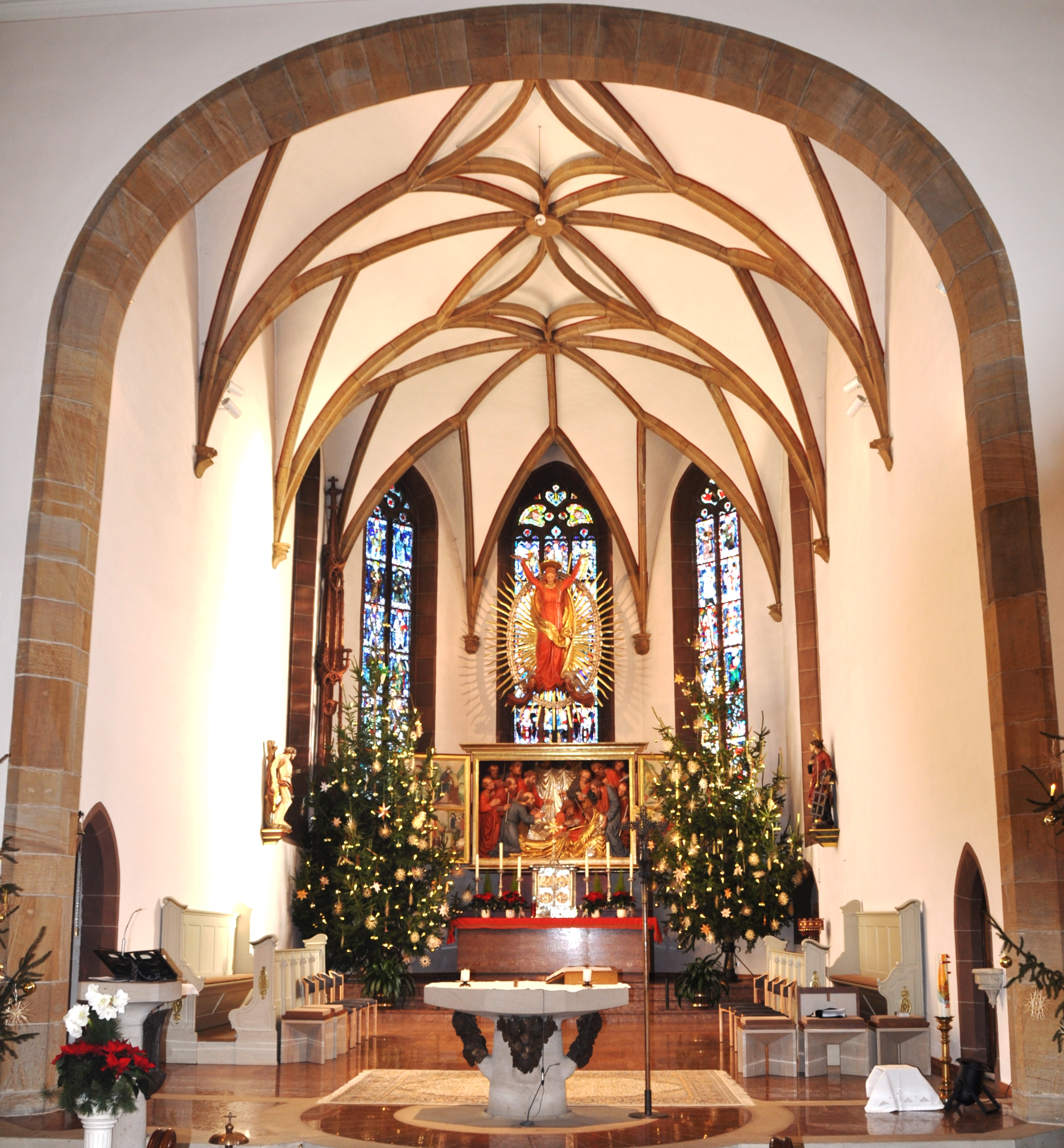 Spätgotischer Chor von 1507, Kath. Pfarrkirche St. Maria Himmelfahrt Herxheim, mit Weihnachtsschmuck